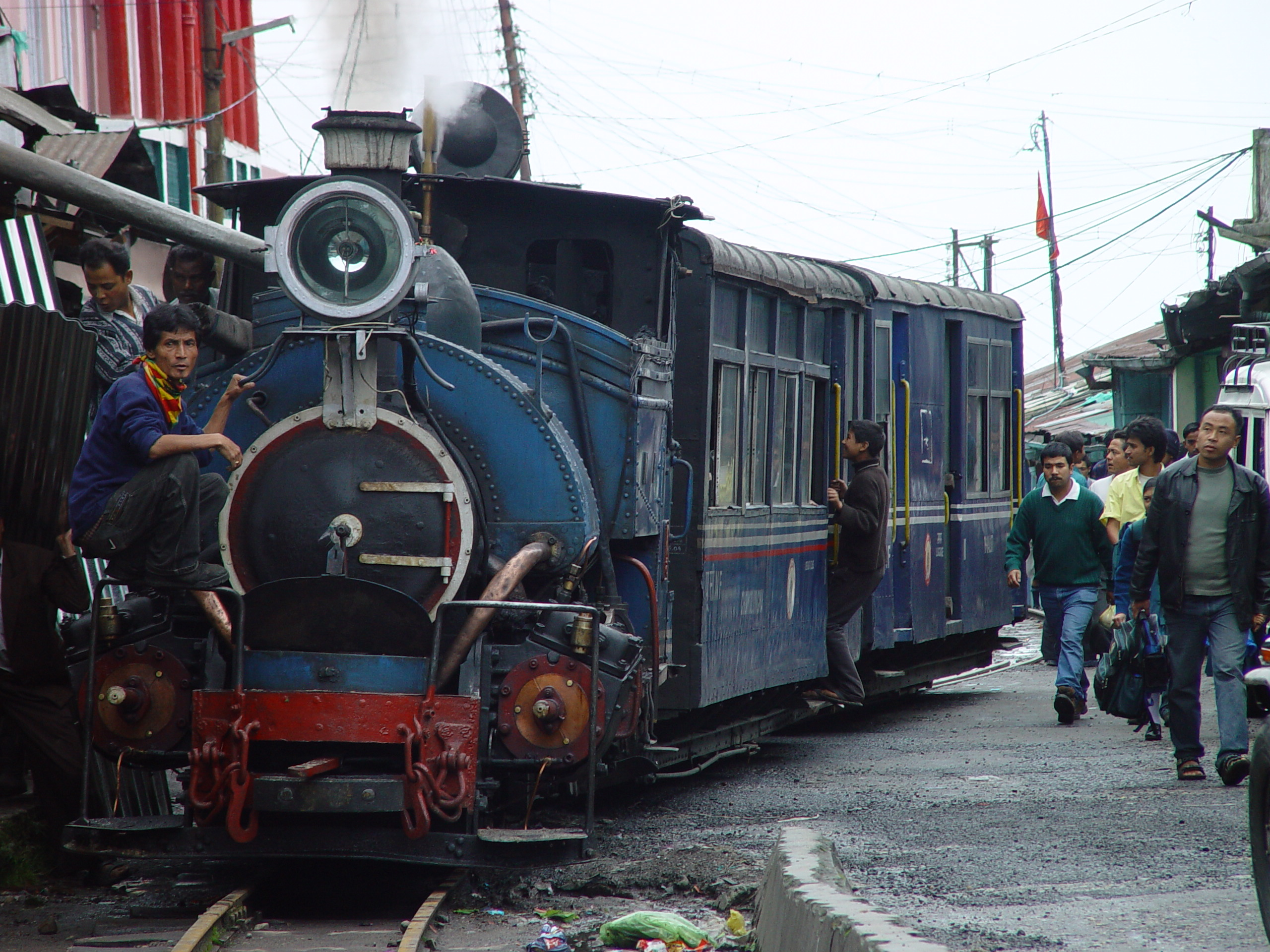 Toy Train, Darjeeling, India